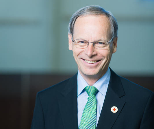 Pertti Torstila on toiminut Suomen Punaisen Ristin puheenjohtajana vuodesta 2014 alkaen.